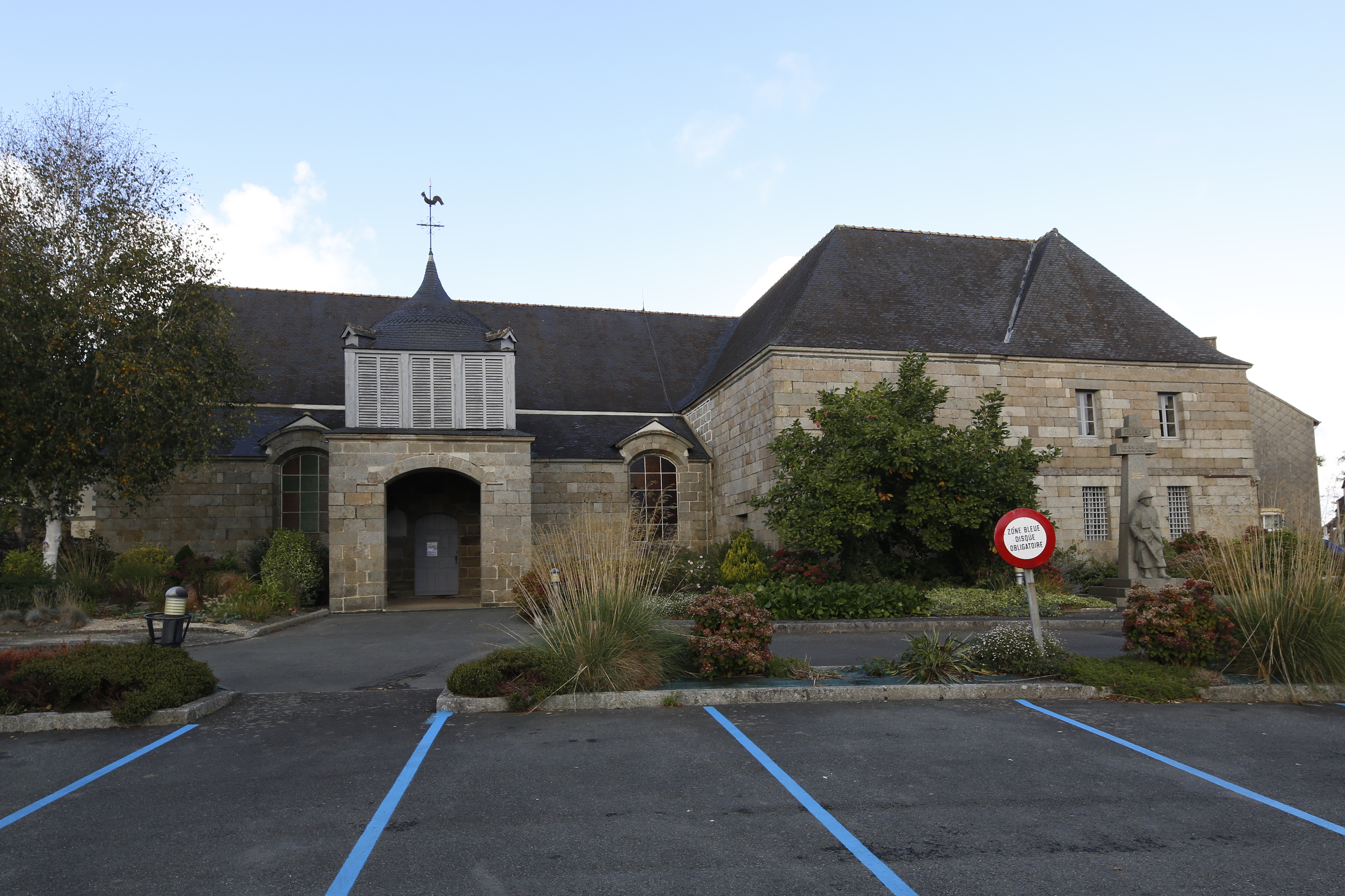 Église Saint-Pierre de Plouguernével.